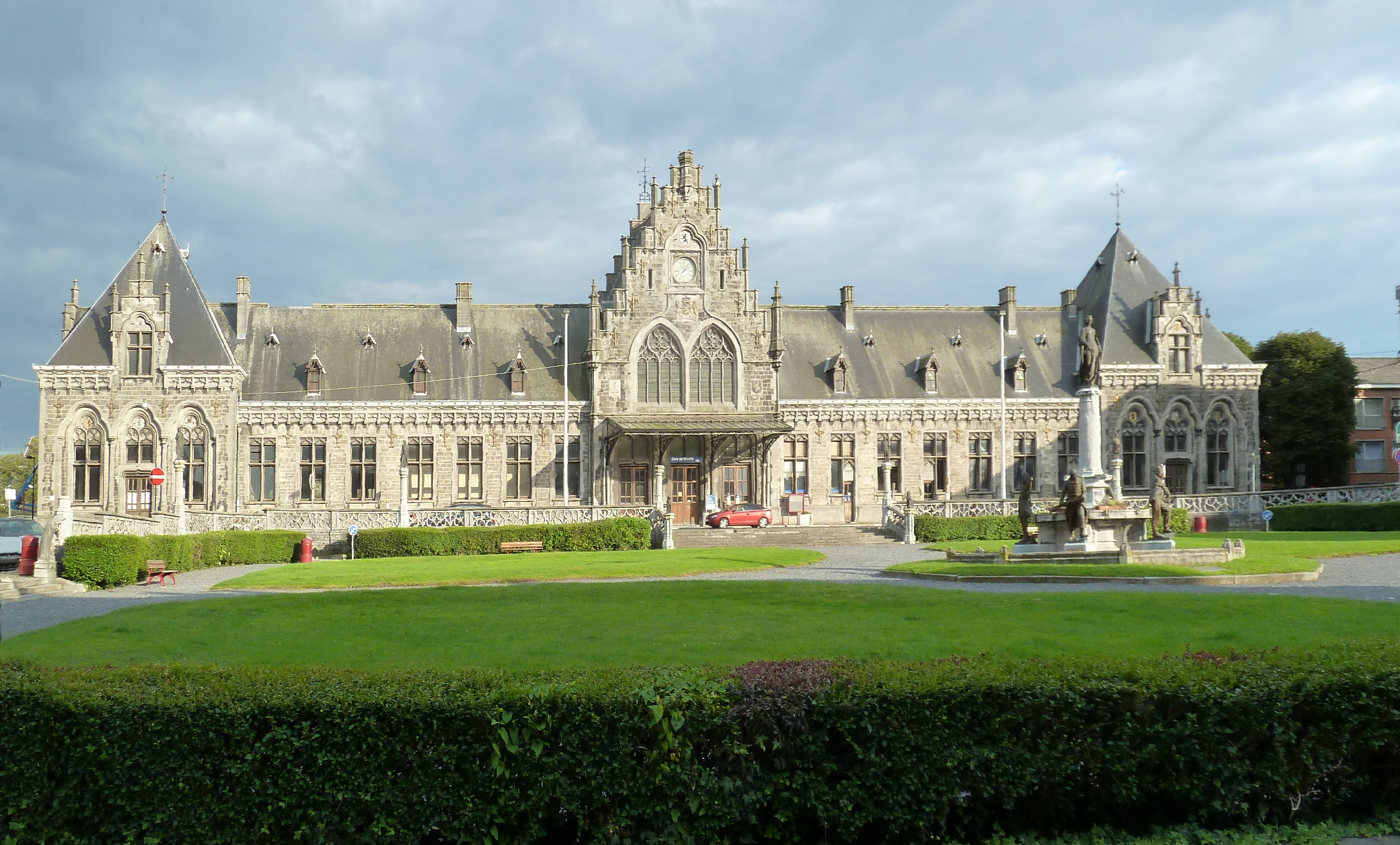 Binche (Belgique), Place Derbaix. – La gare.